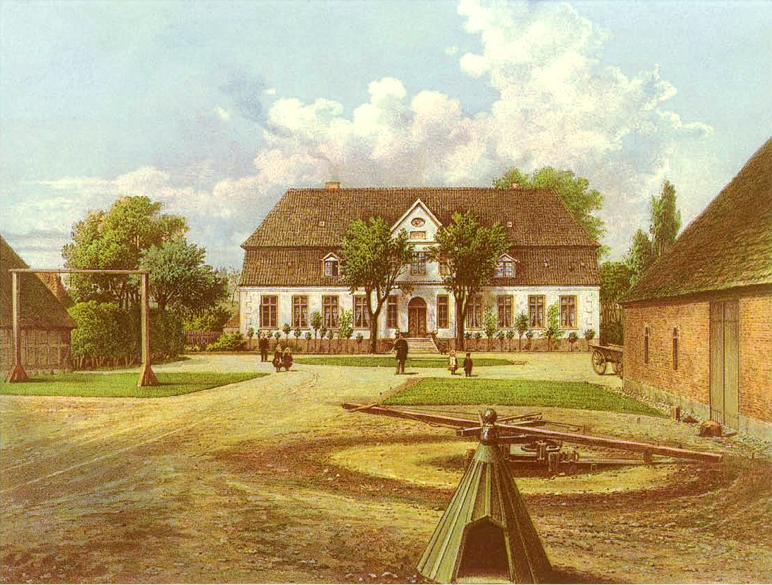 Gut Fahrenstedt, Kreis Schleswig